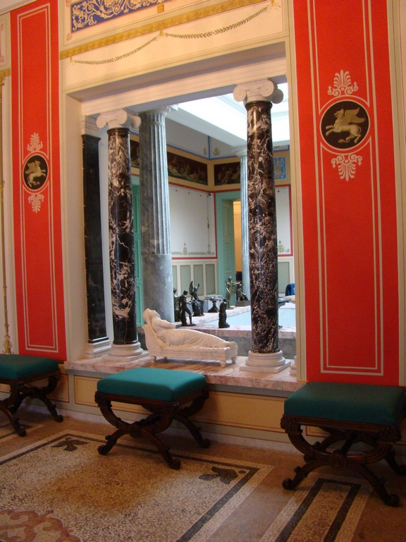 Вид из гостиной в атриум. Царицын павильон